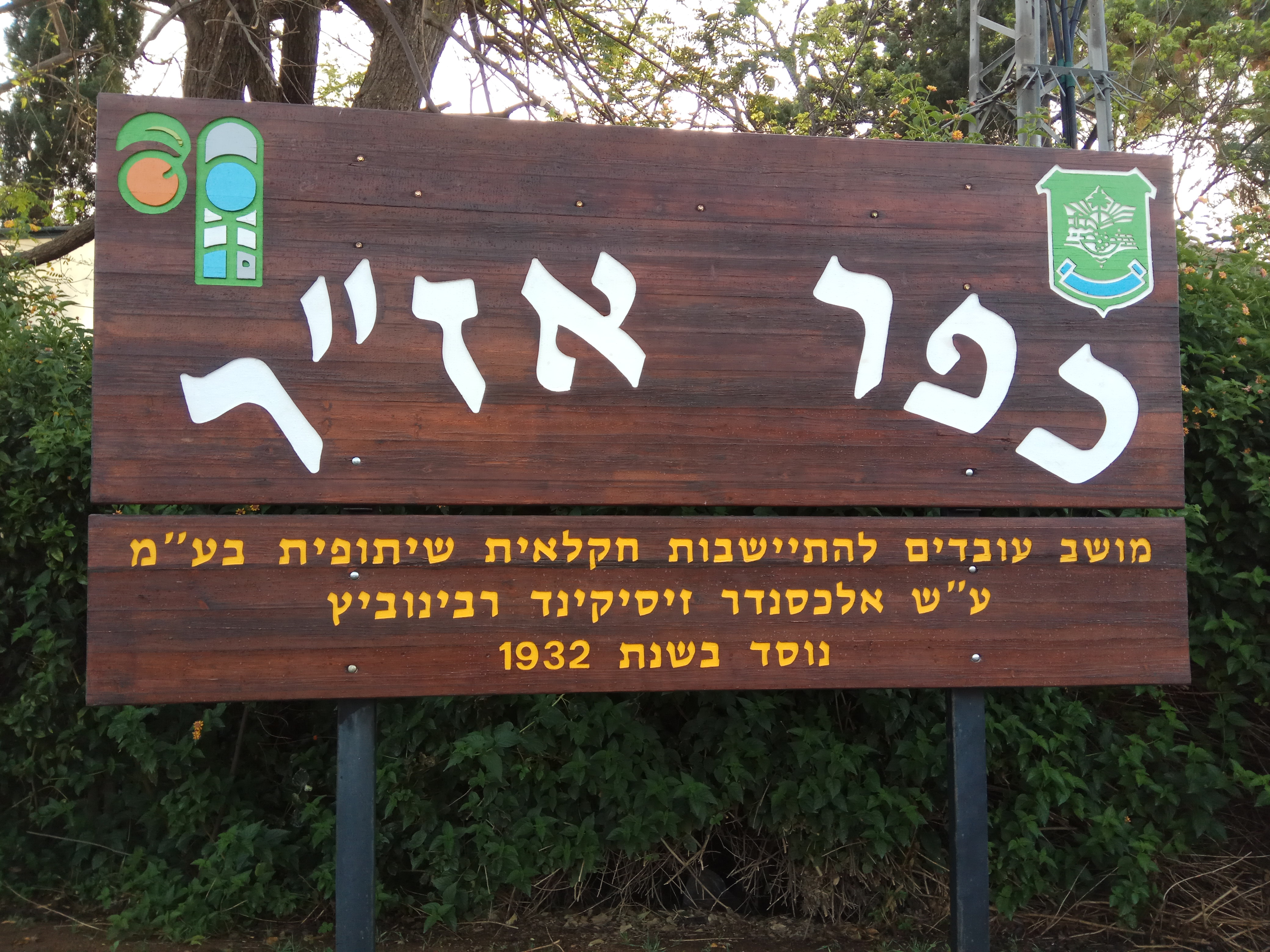 שלט בכניסה לכפר אז"ר